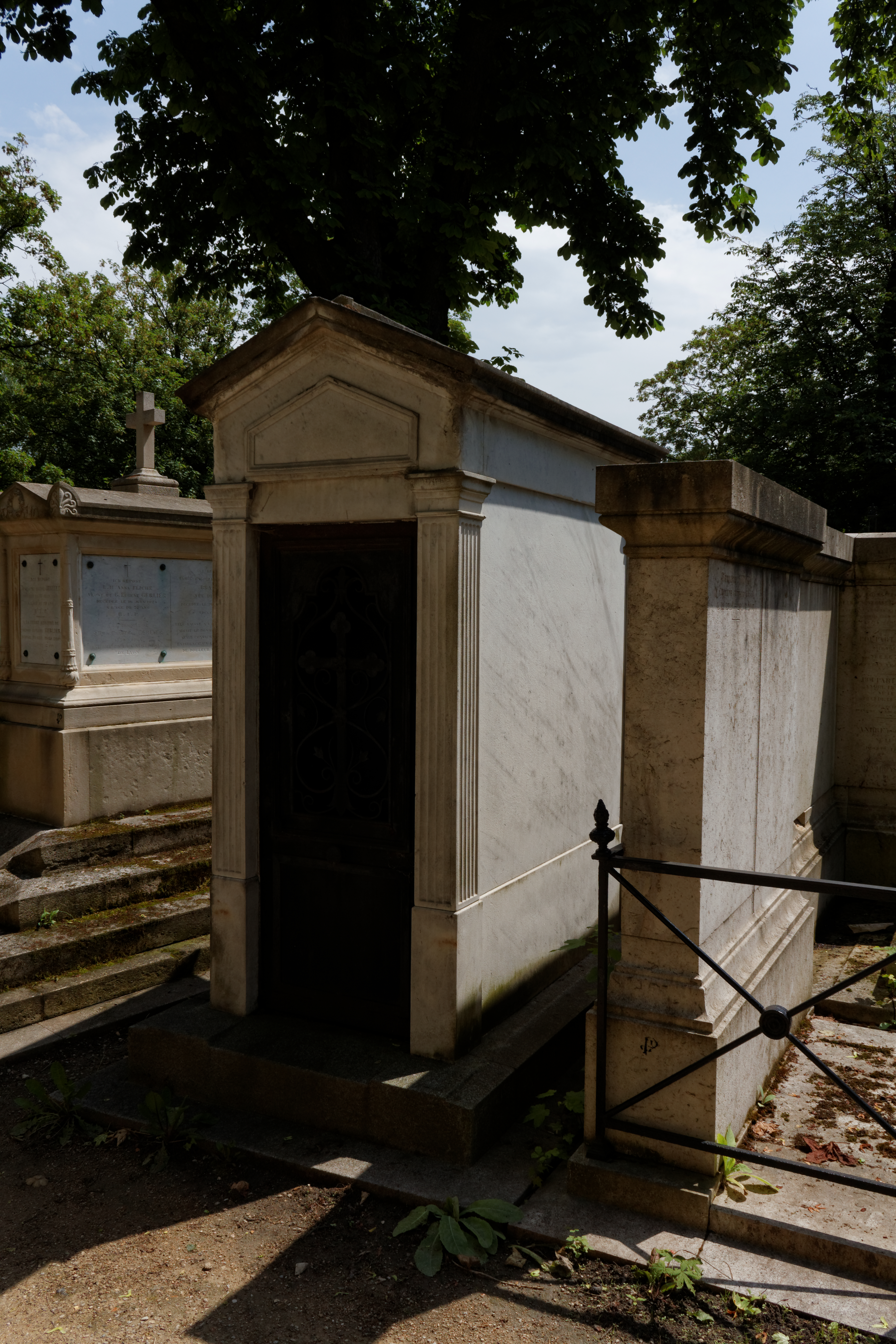 Chapelle